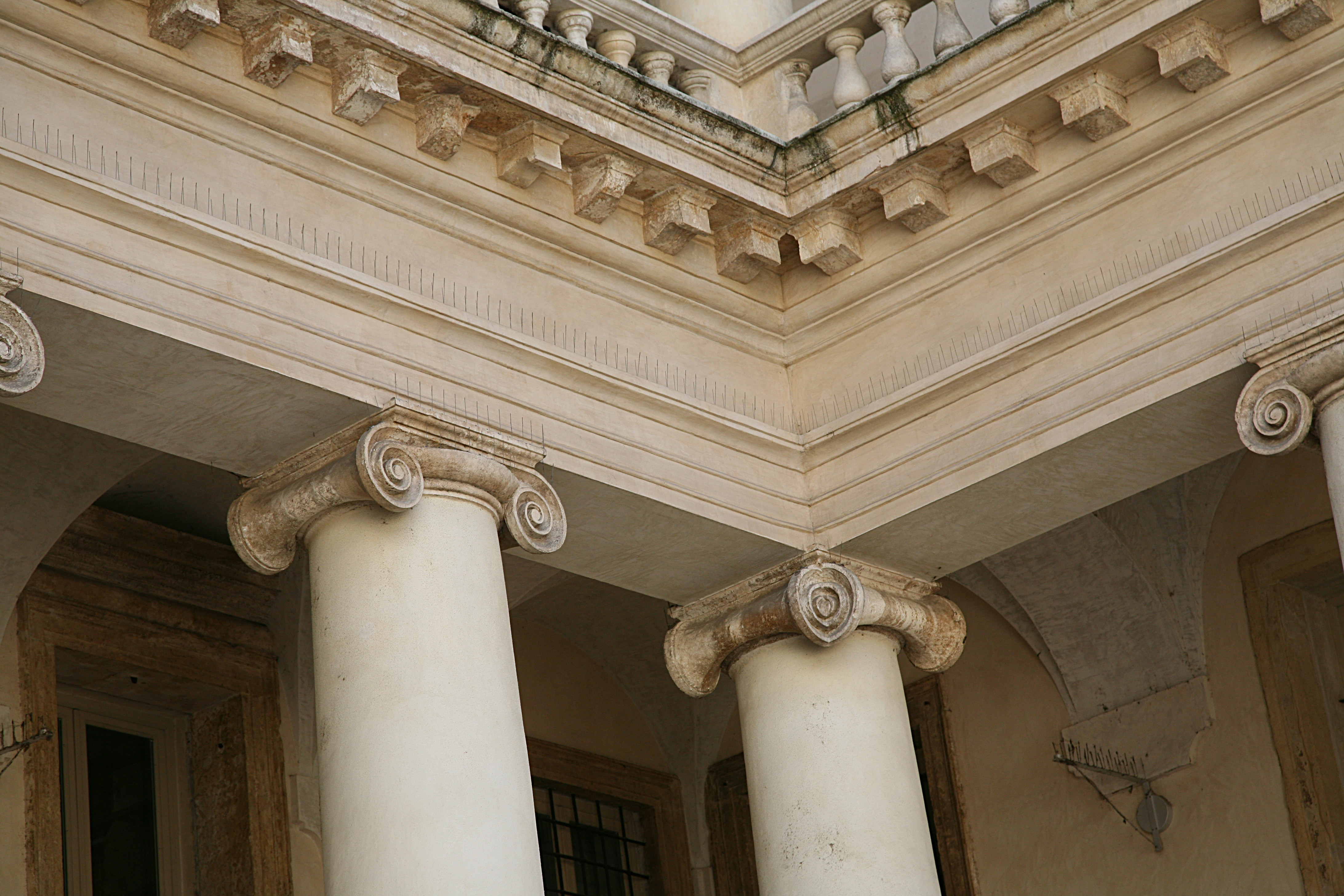 Palazzo Barbaran Da Porto in Vicenza